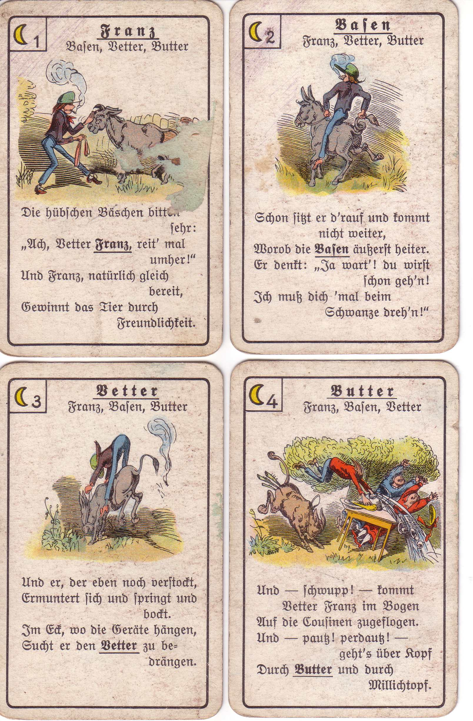 Quartettspiel Wilhem Busch.